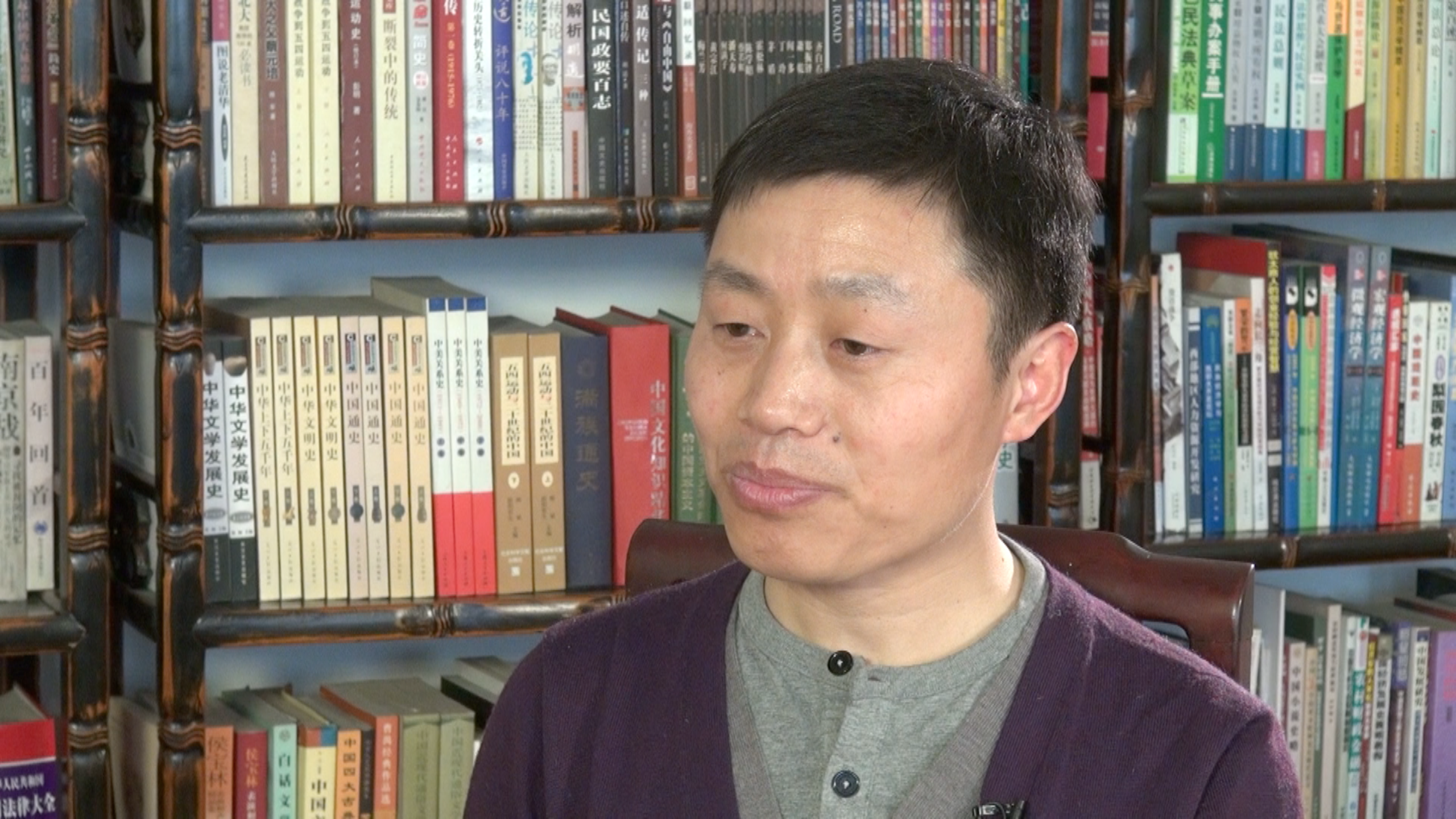 前《纽约时报》摄影师、独立制片人杜斌接受美国之音采访